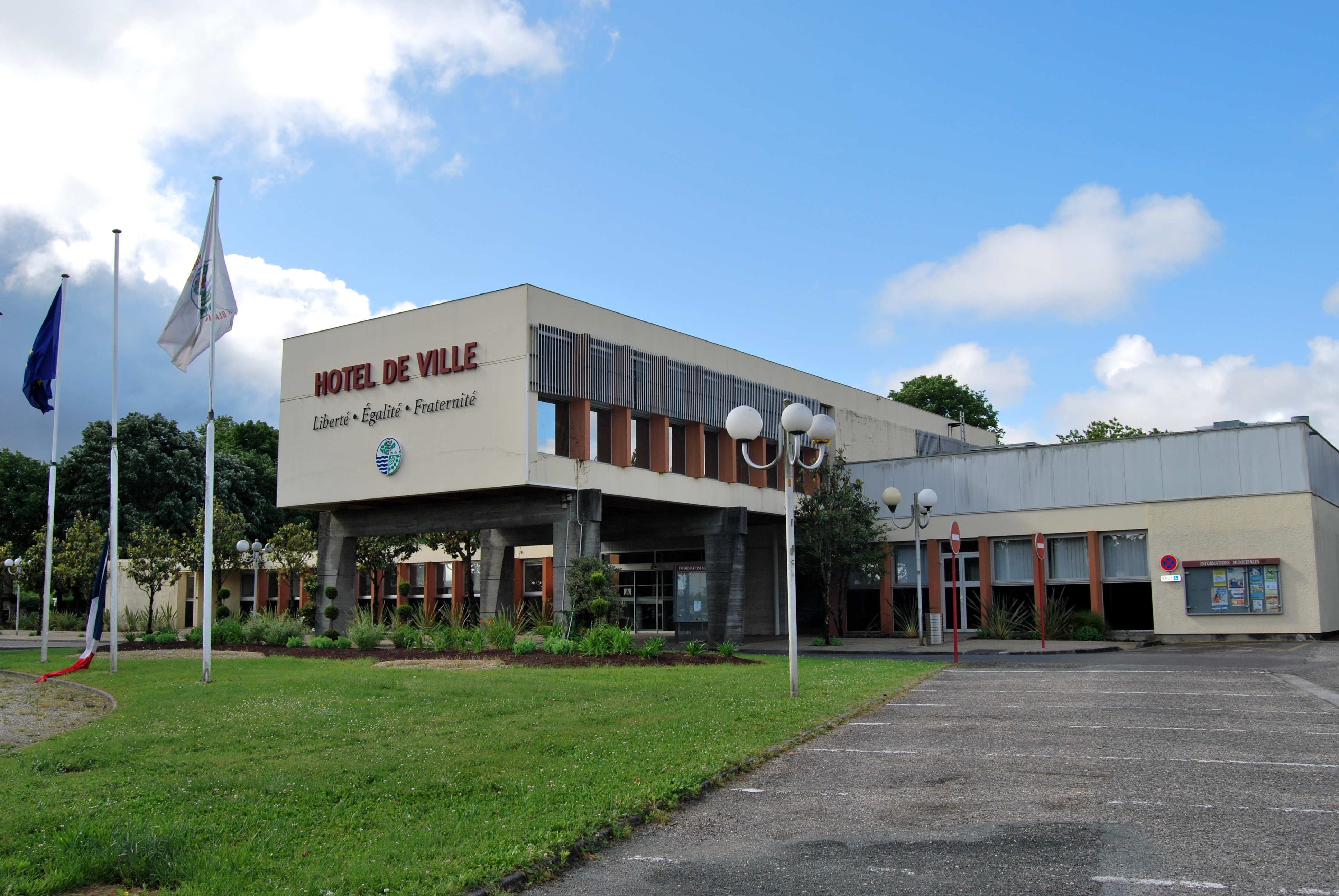 Carbon-Blanc Mairie